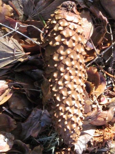 マツハダの球果。富士山吉田口１合目付近にて撮影